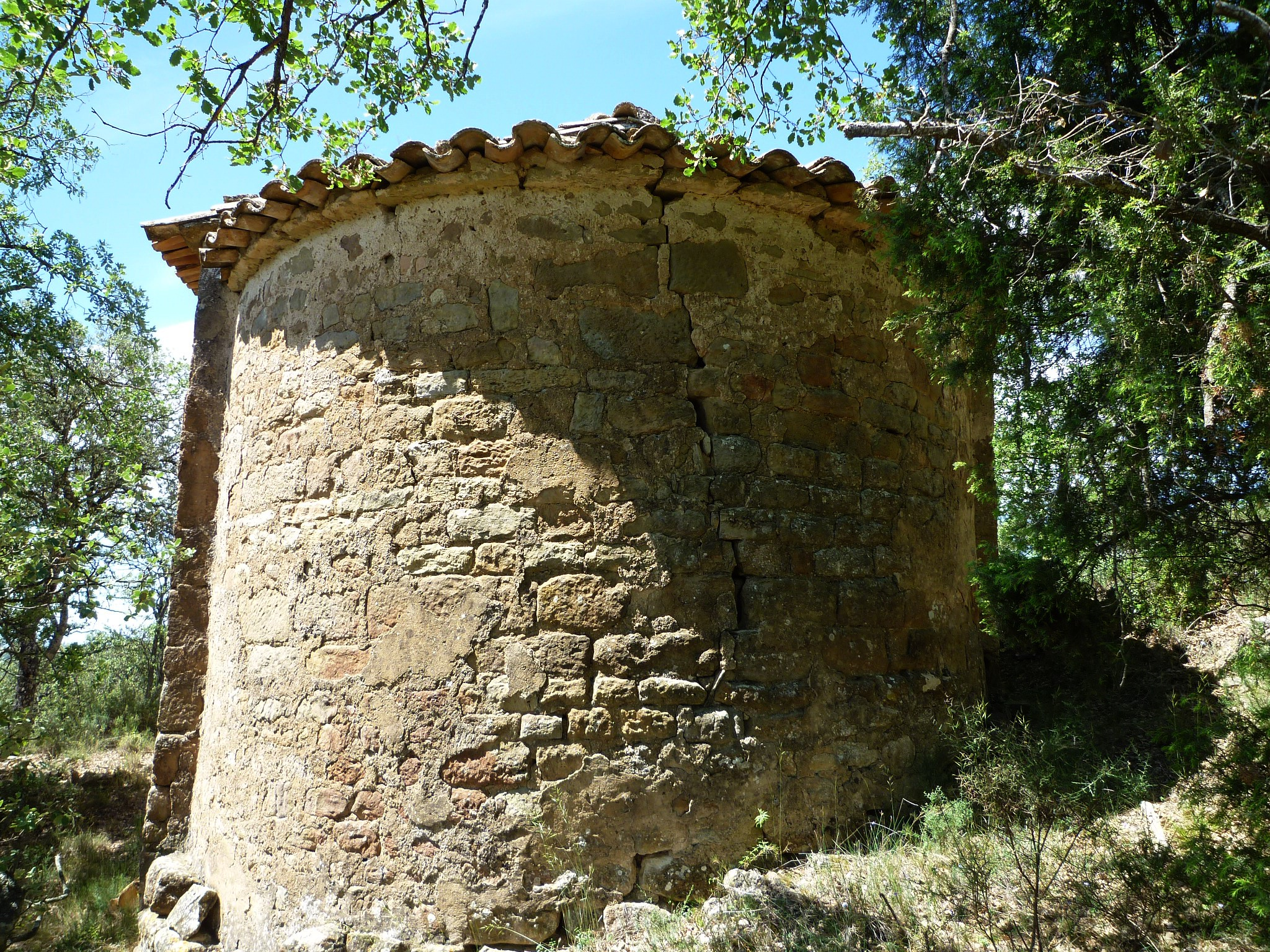 Capella de Sant Jaume de Rossells (Pinell de Solsonès): absis